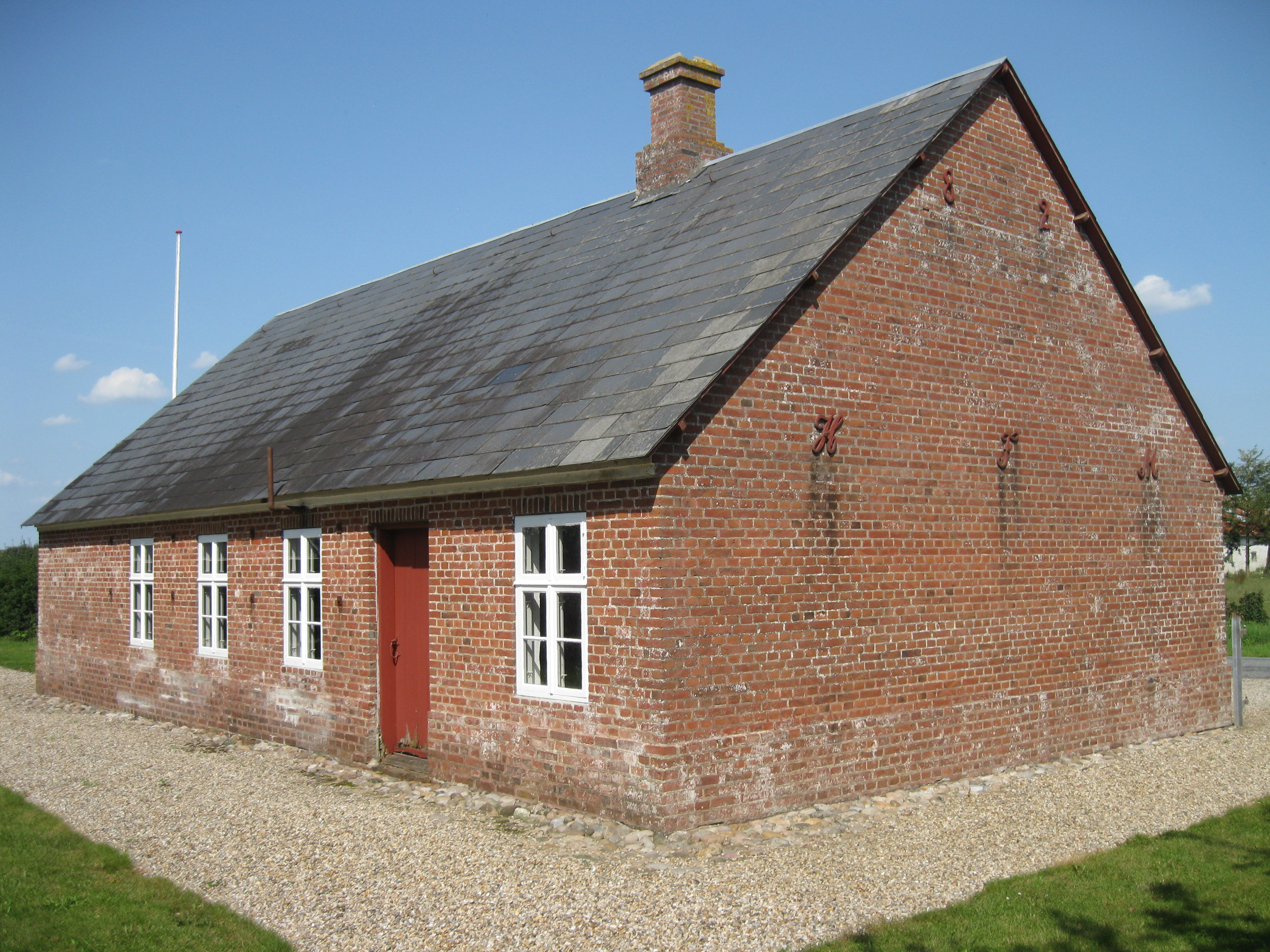 Hjedding Andelsmejeri, Danmarks første andelsmejeri